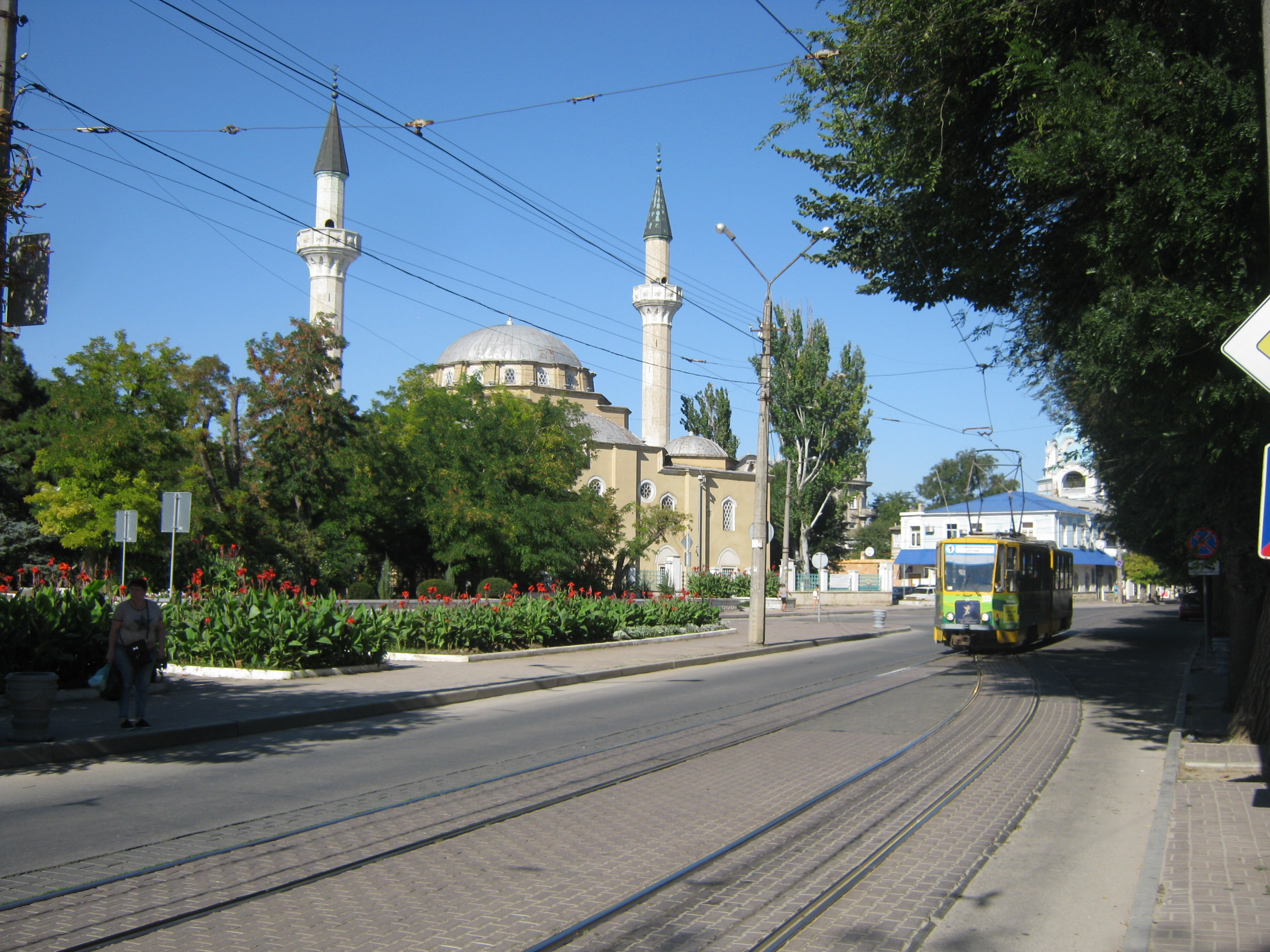 Трамвай на улице Революции в Евпатории